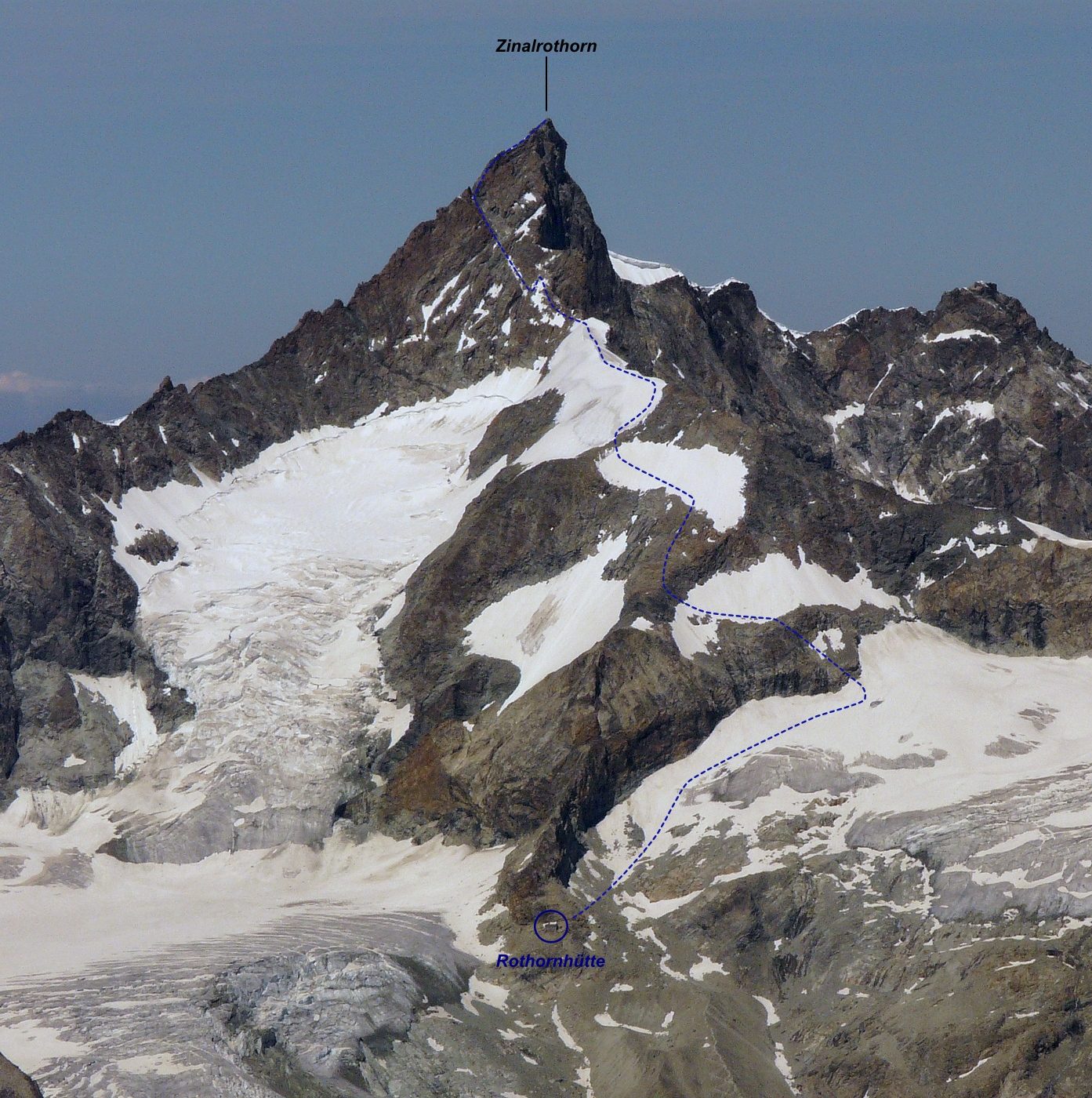 Zinalrothorn cresta sud est con indicazione di percorso della via normale.